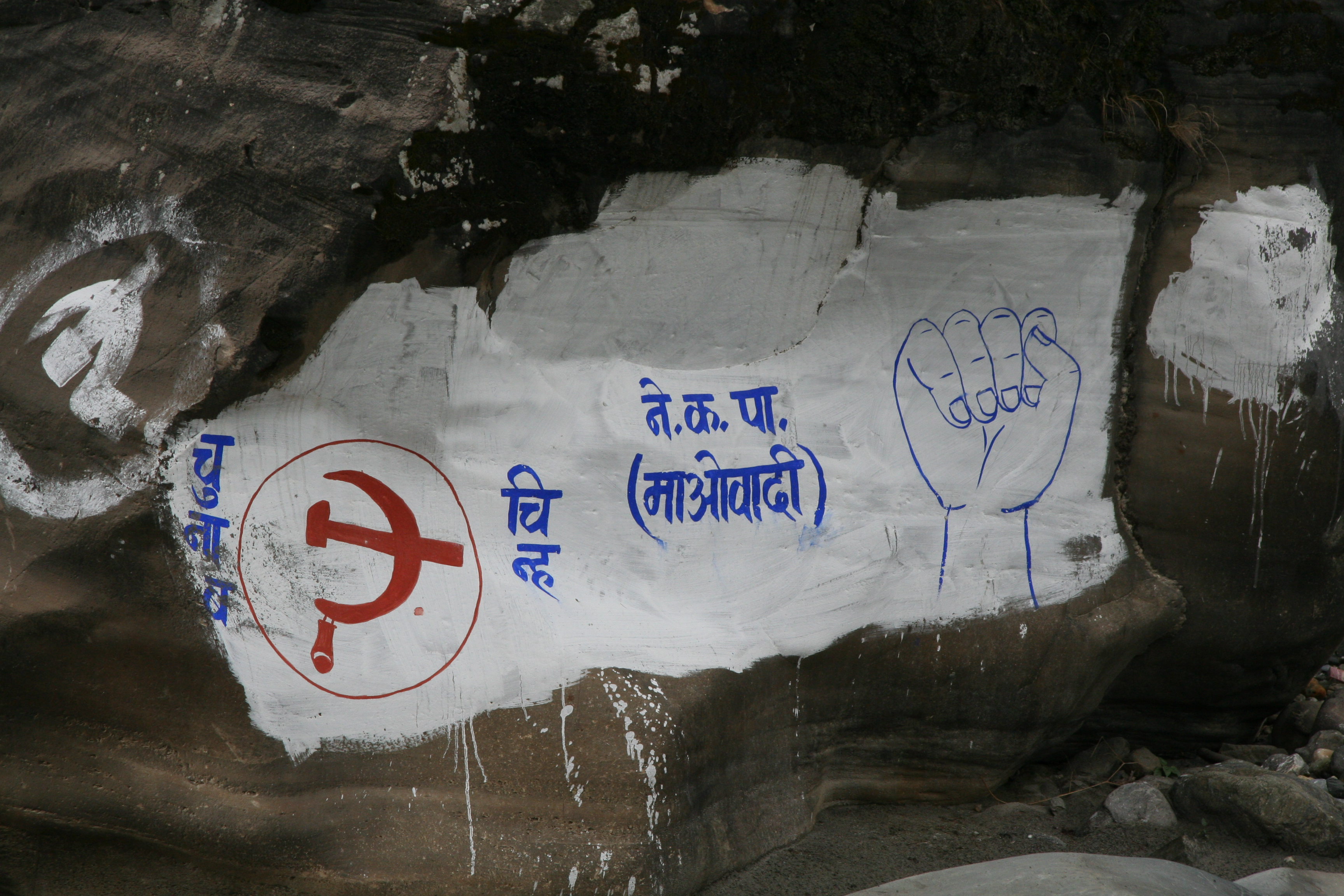 Valpropaganda for NKP(m), i form av grafitti.